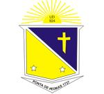 Brasão Ponta de Pedras.